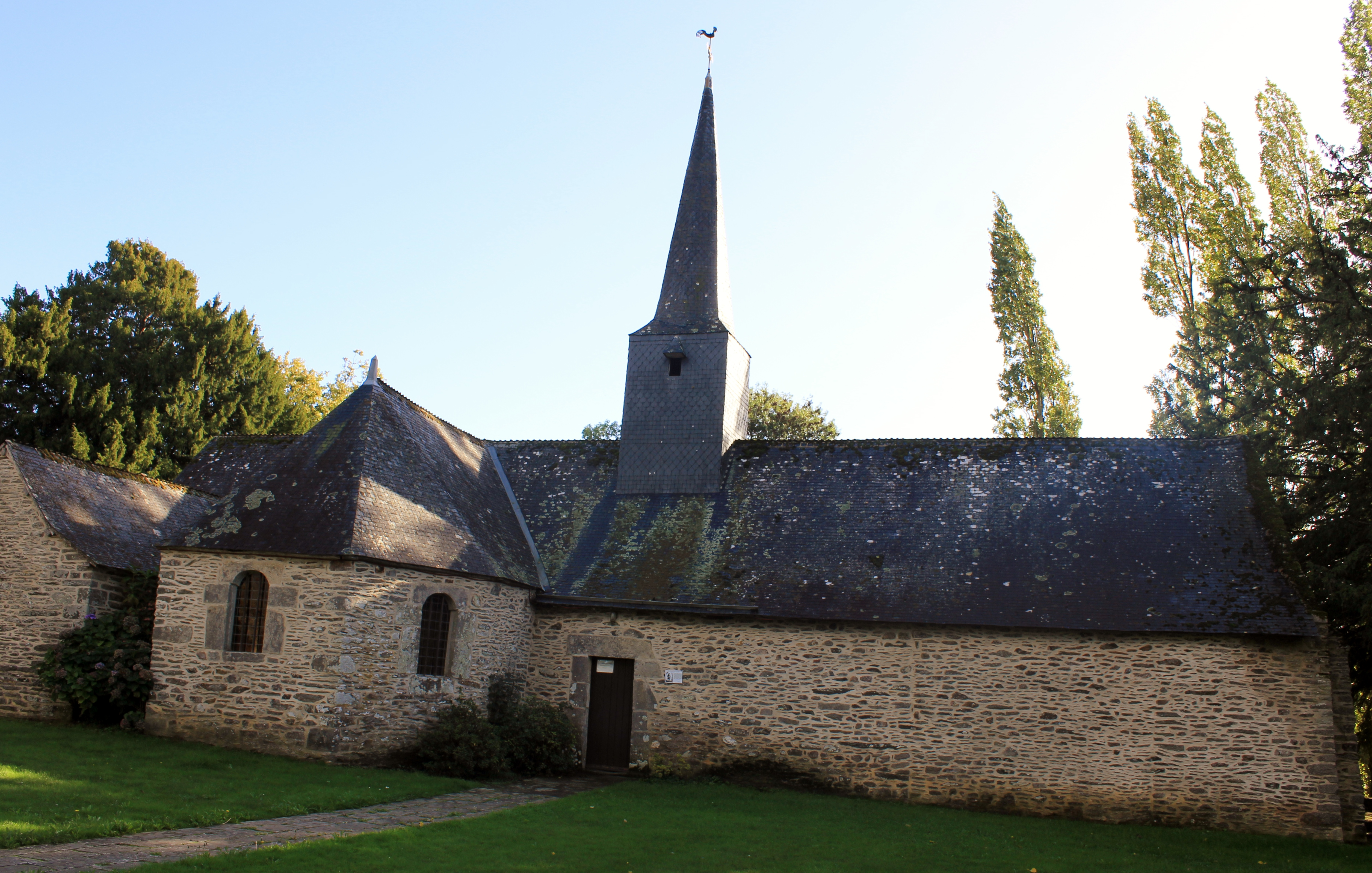 Chapelle Saint-Mélec au lieu-dit de Pomeleuc, Lanouée : vue depuis le nord